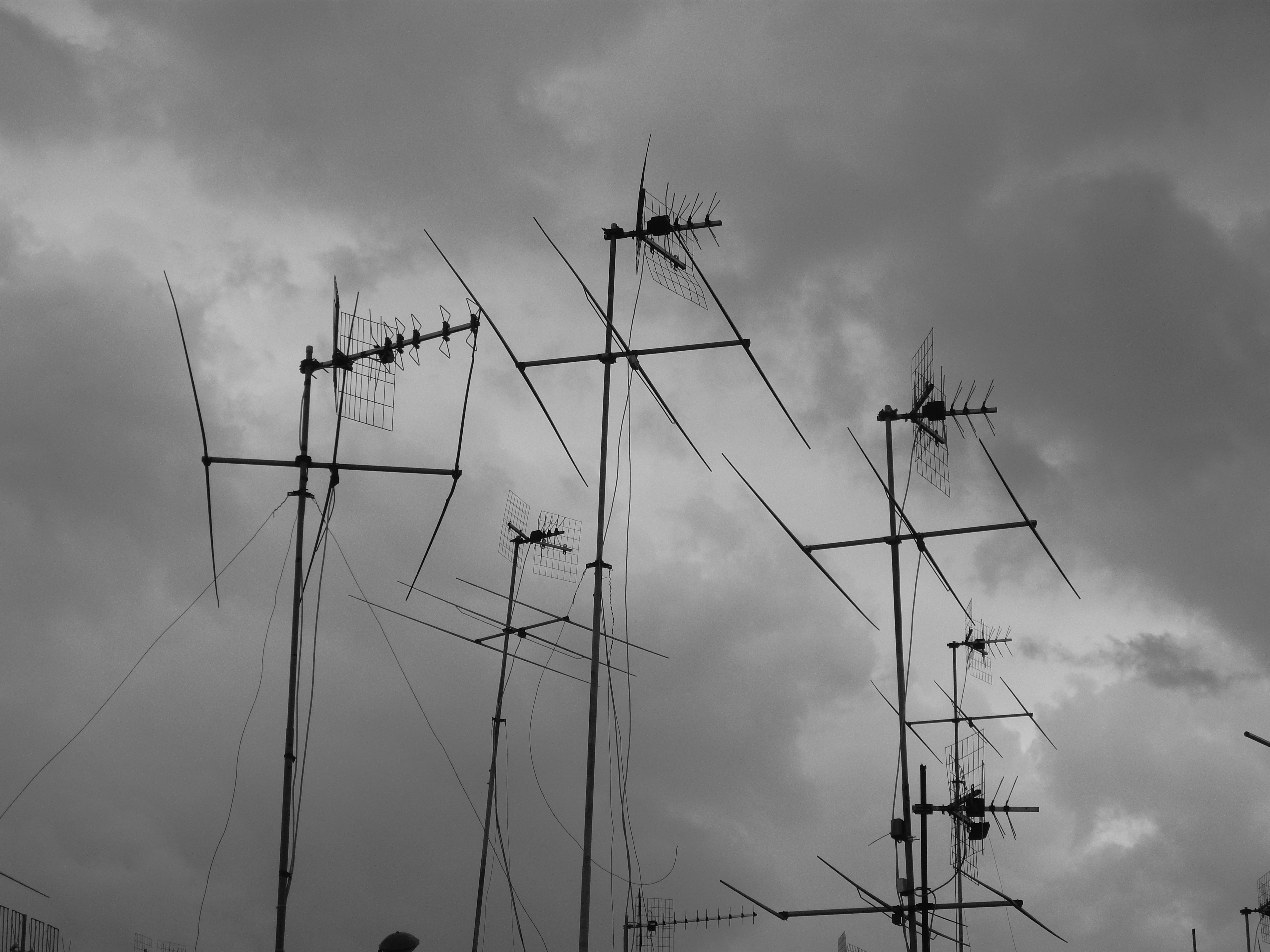 Autore foto: Roberto De Martino